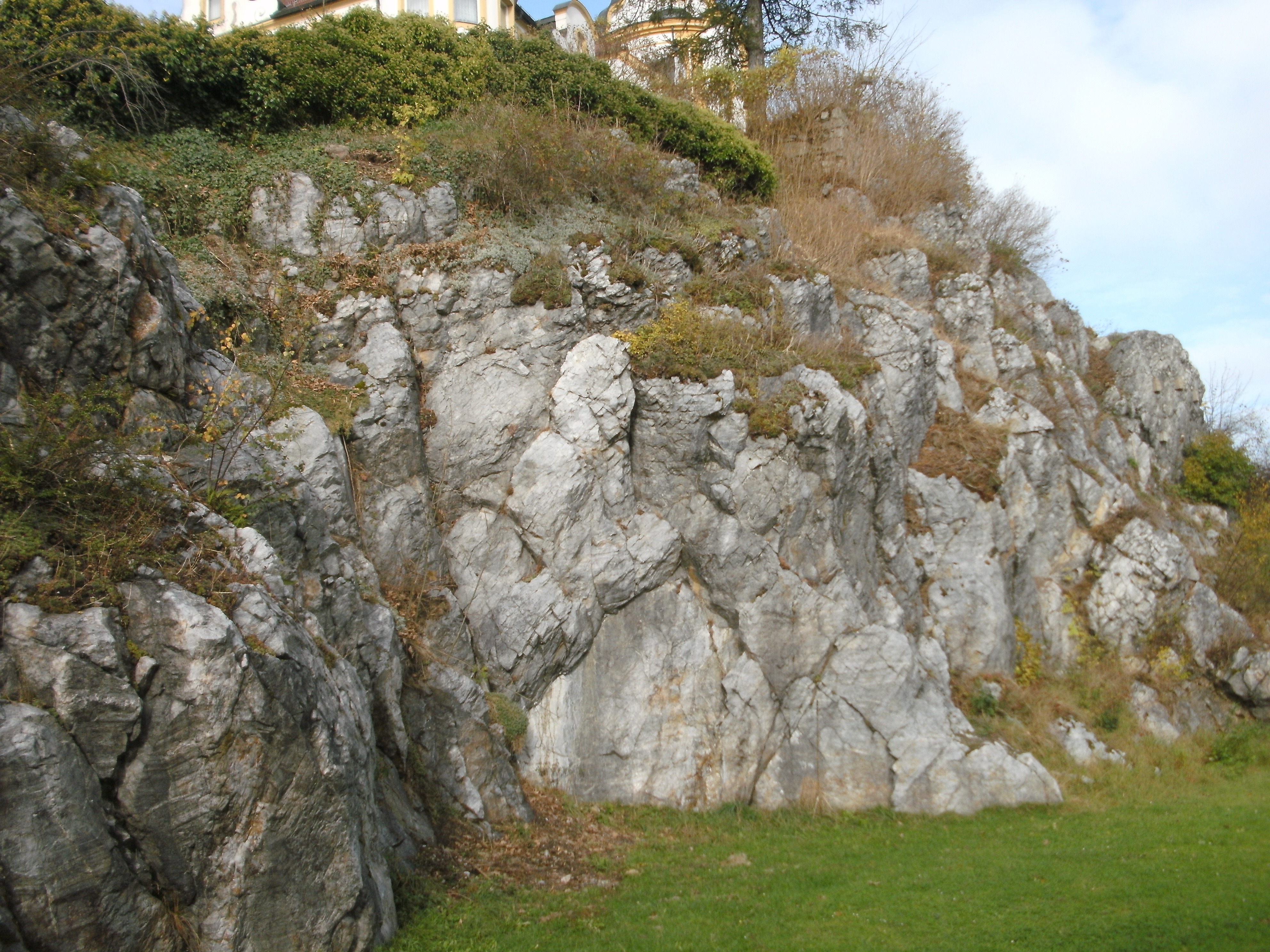 Kreuzberg in Pleystein, Rosenquarzfelsen, Geotop